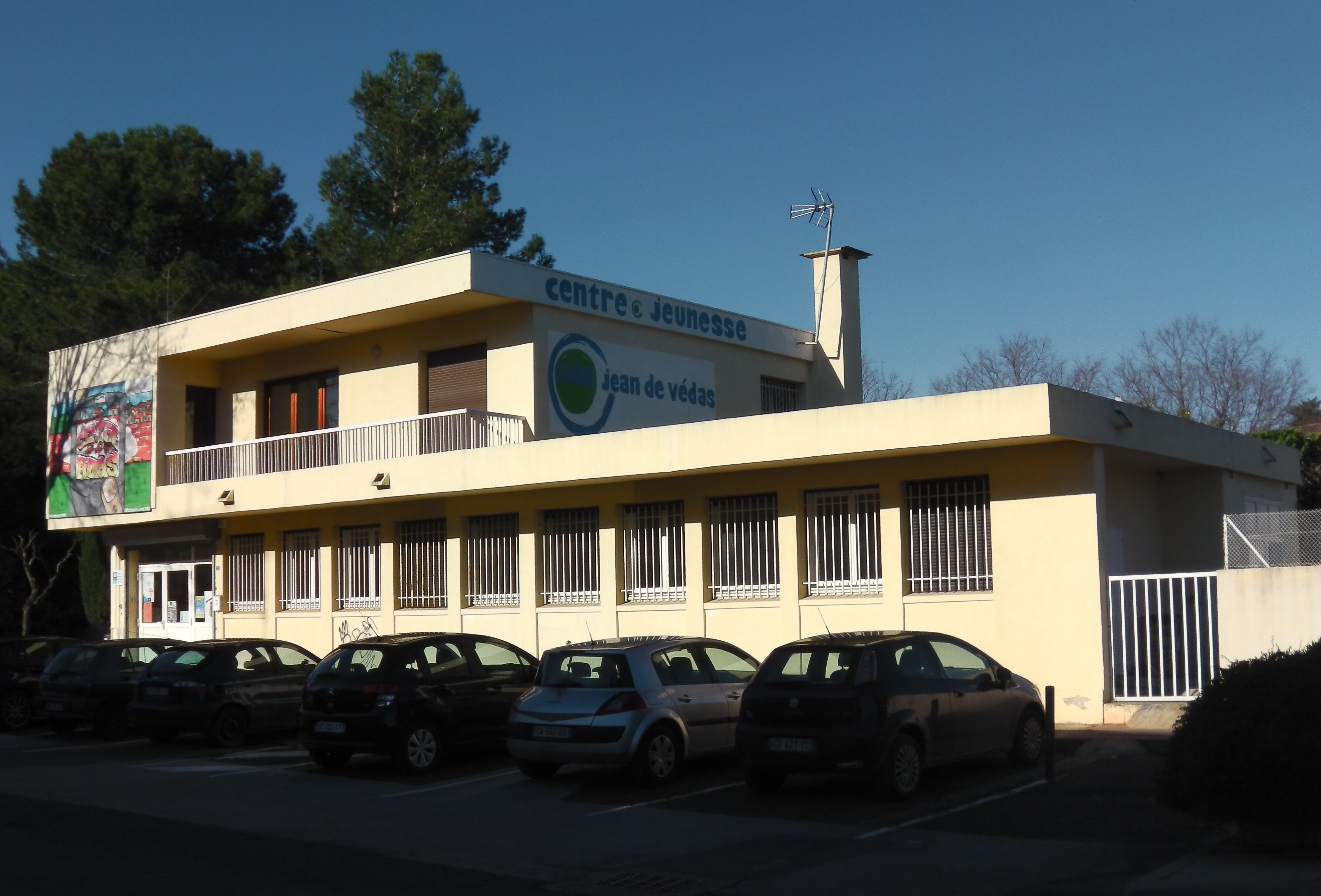 Le centre jeunesse municipal de Saint-Jean-de-Védas (Hérault)